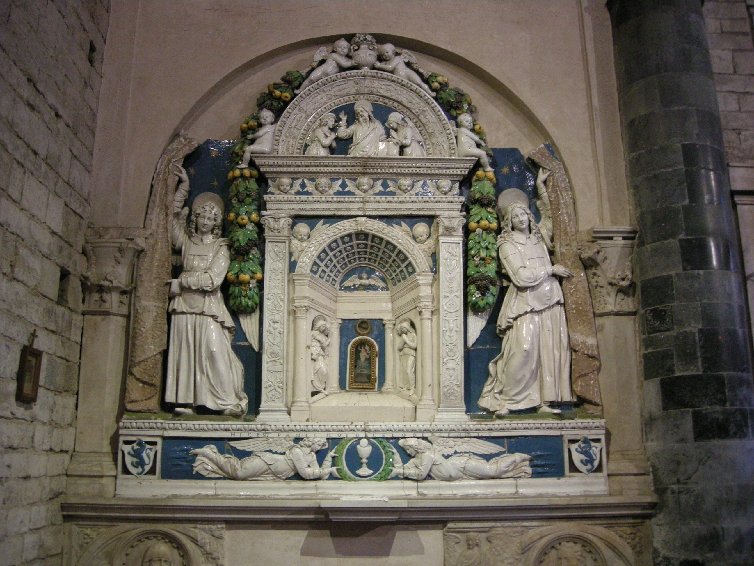 Santi apostoli, firenze, interno, tabernacolo di Giovanni della Robbia